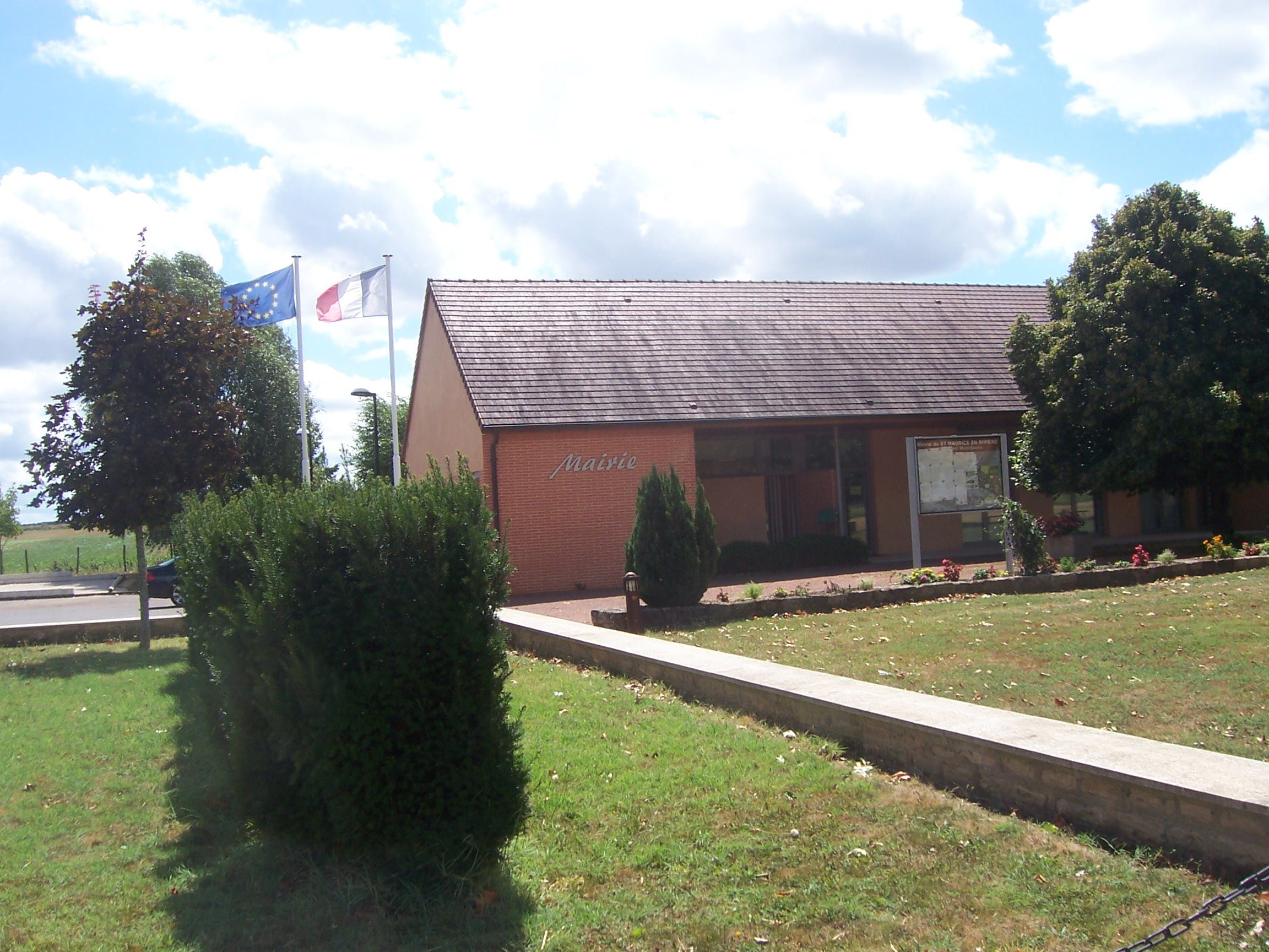 Mairie de Saint-Maurice-en-Rivière